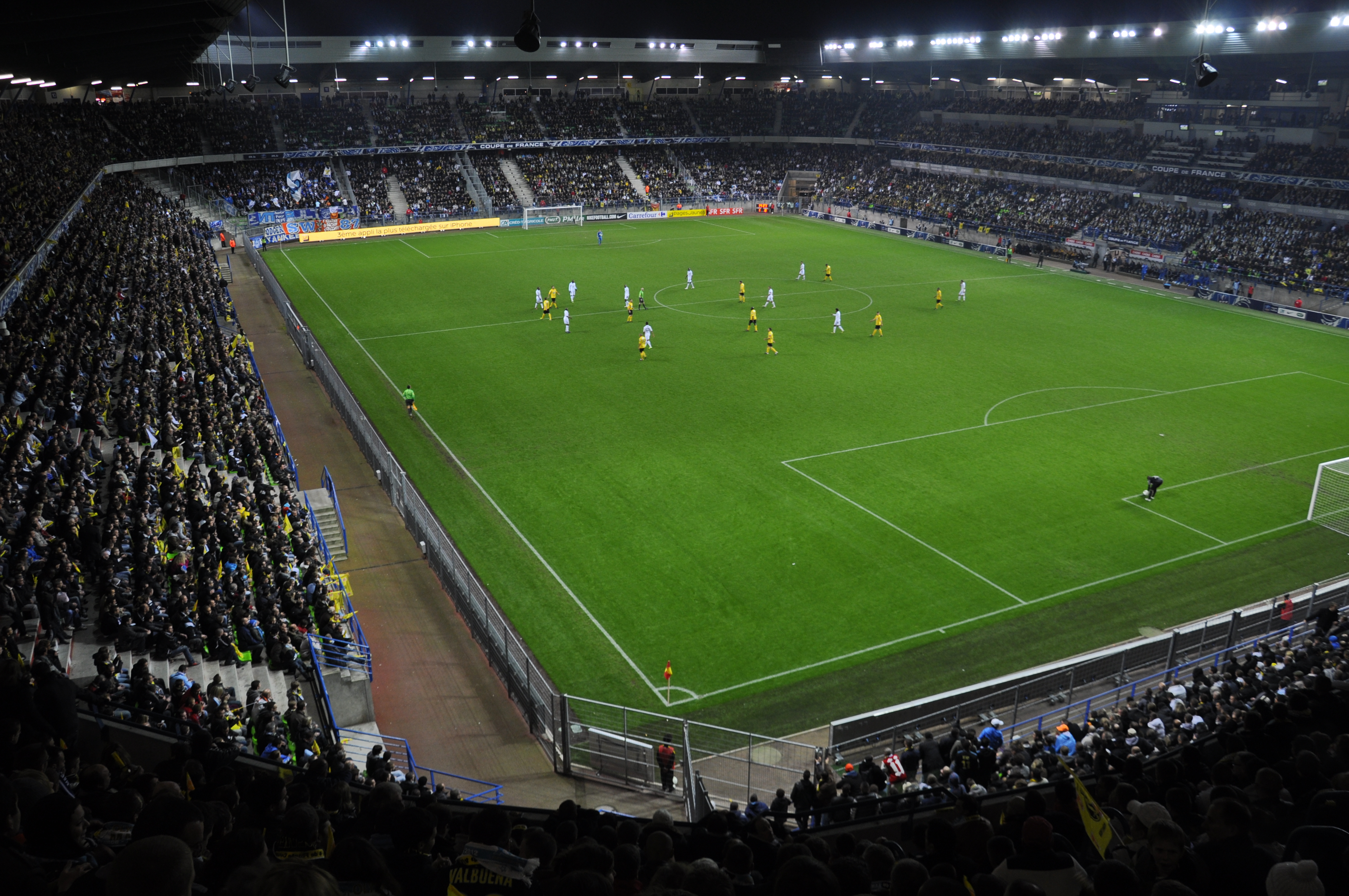 Match de quart de finale de la coupe de France entre l'US Quevilly et l'Olympique de Marseille au stade Michel d'Ornano le 20 mars 2012